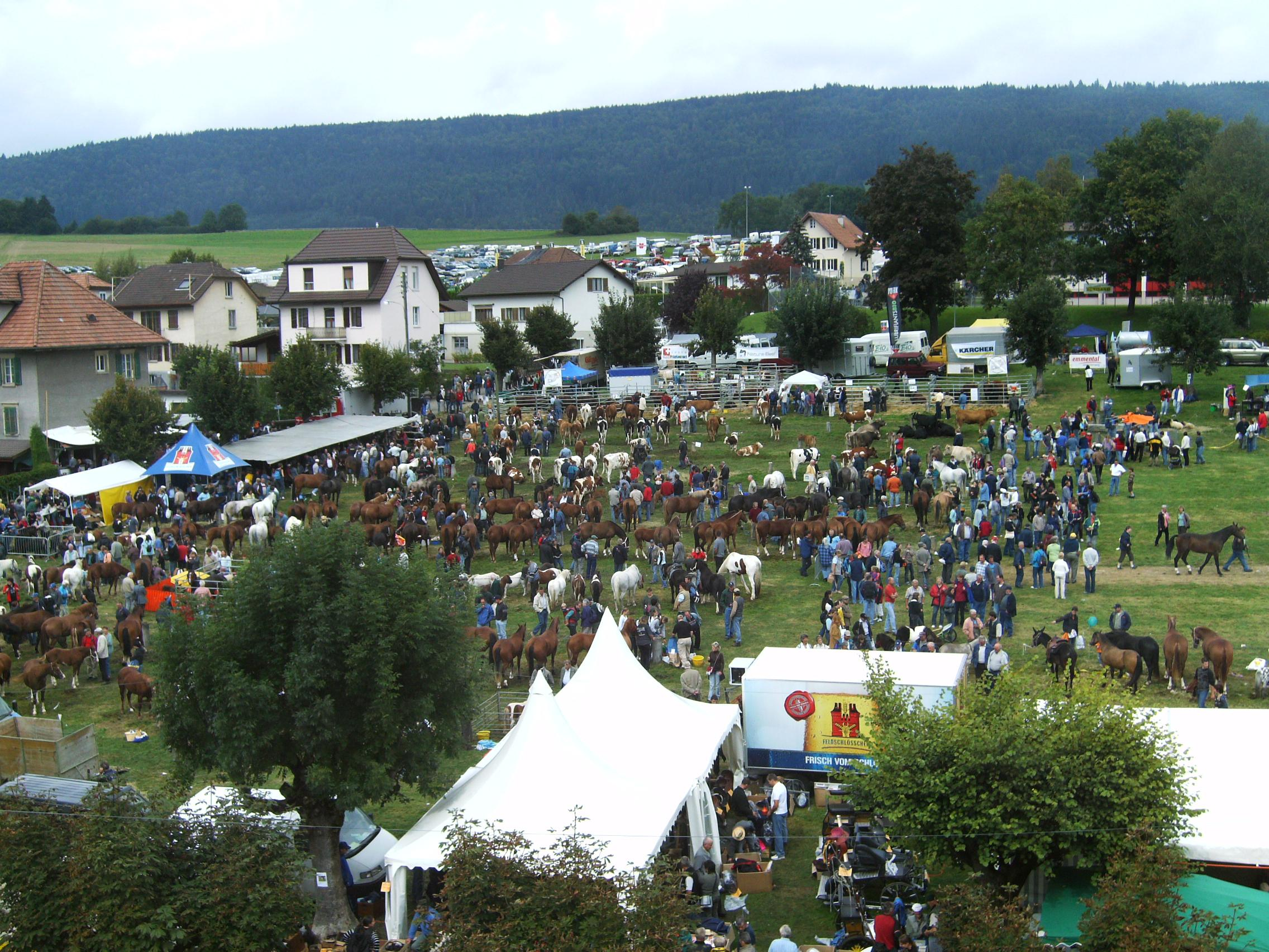 Champ de foire, Foire de Chaindon 2007 à Reconvilier (canton de Berne, Suisse). Prise de la photo : depuis l'école primaire en direction du nord-ouest.